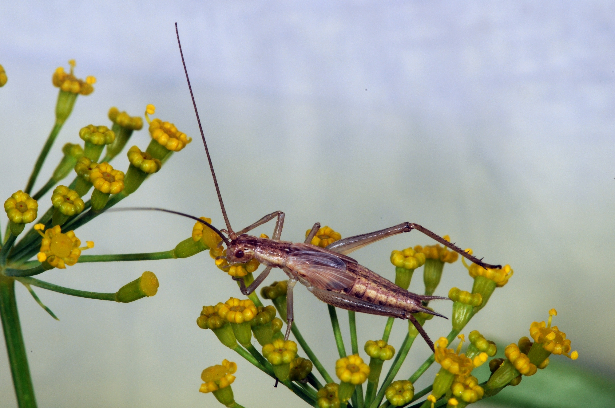 Oecanthus pellucens, Männchen, Mainzer Sand, Rheinland-Pfalz, Deutschland